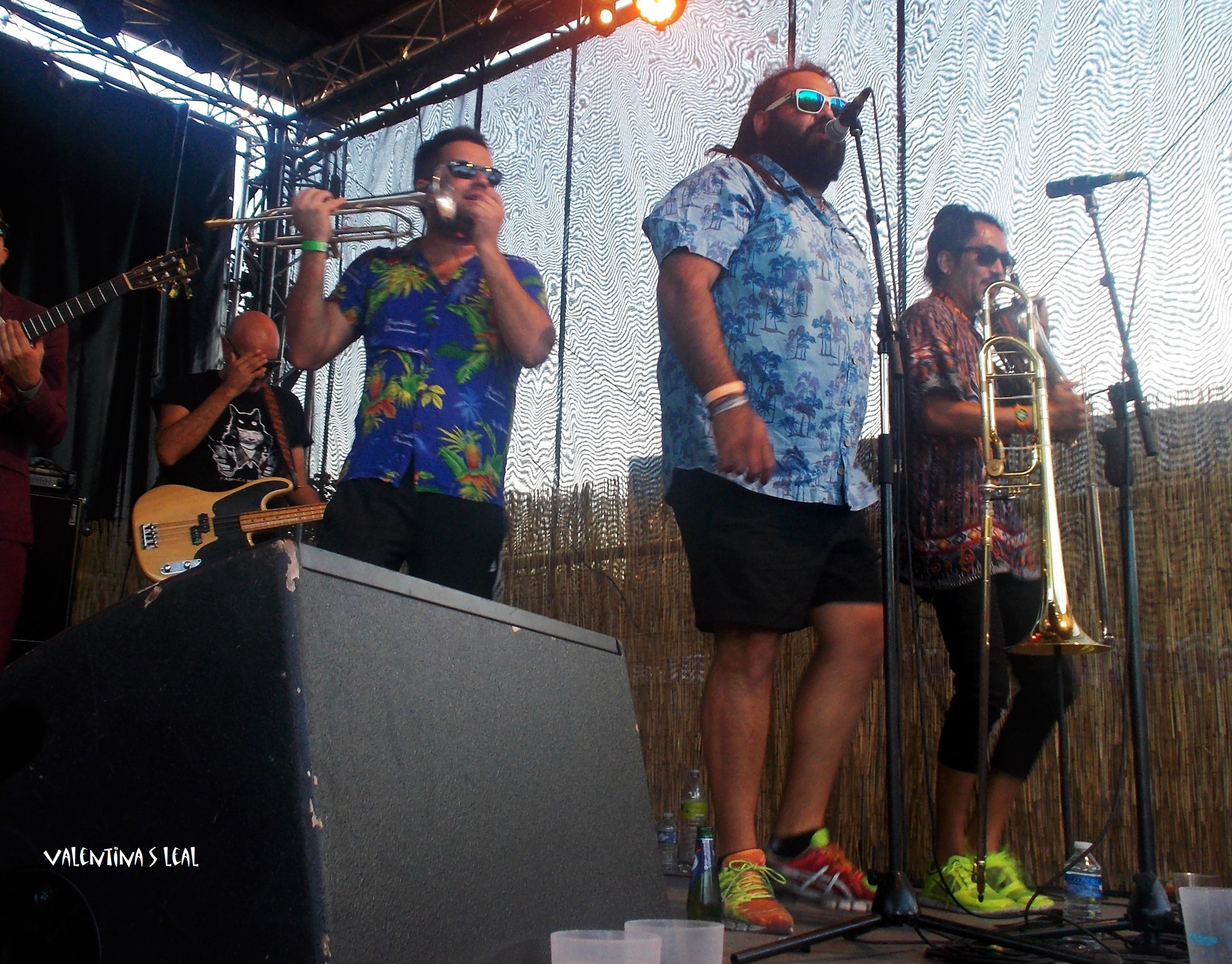 Concert de Chico Trujillo à la porte de la Villette le 5 Août 2015